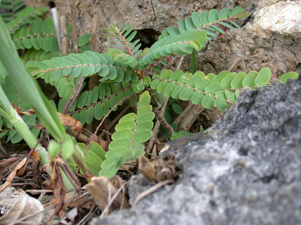 Phyllanthus leptoclados：ハナコミカンボク 2006/08/11 沖縄本島中部：Okinawa Island, Japan